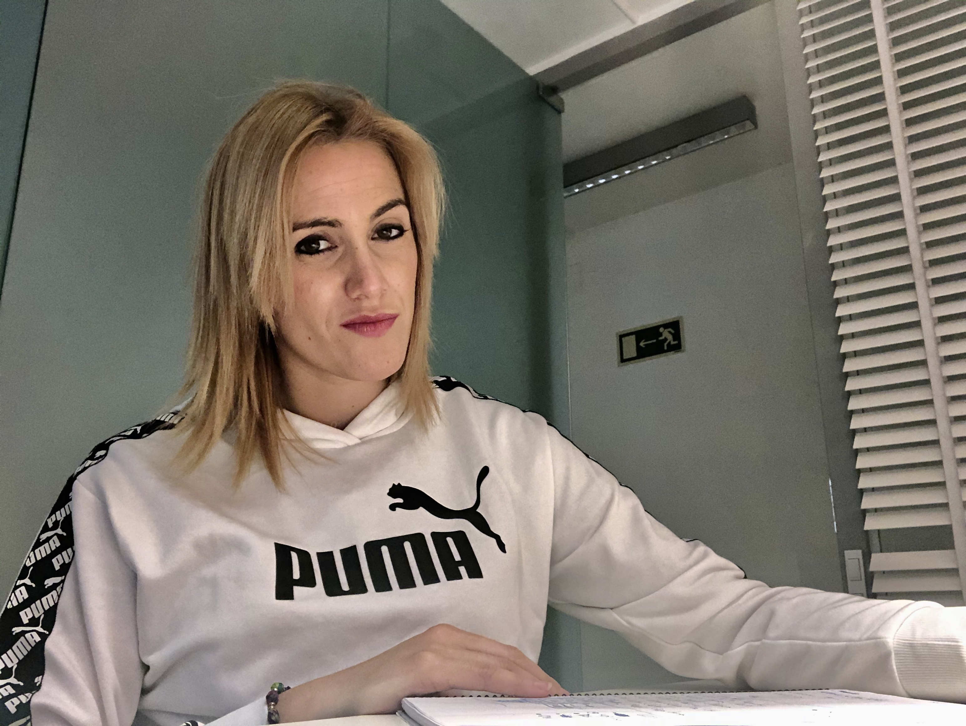 Jennifer Rojo en Barcelona